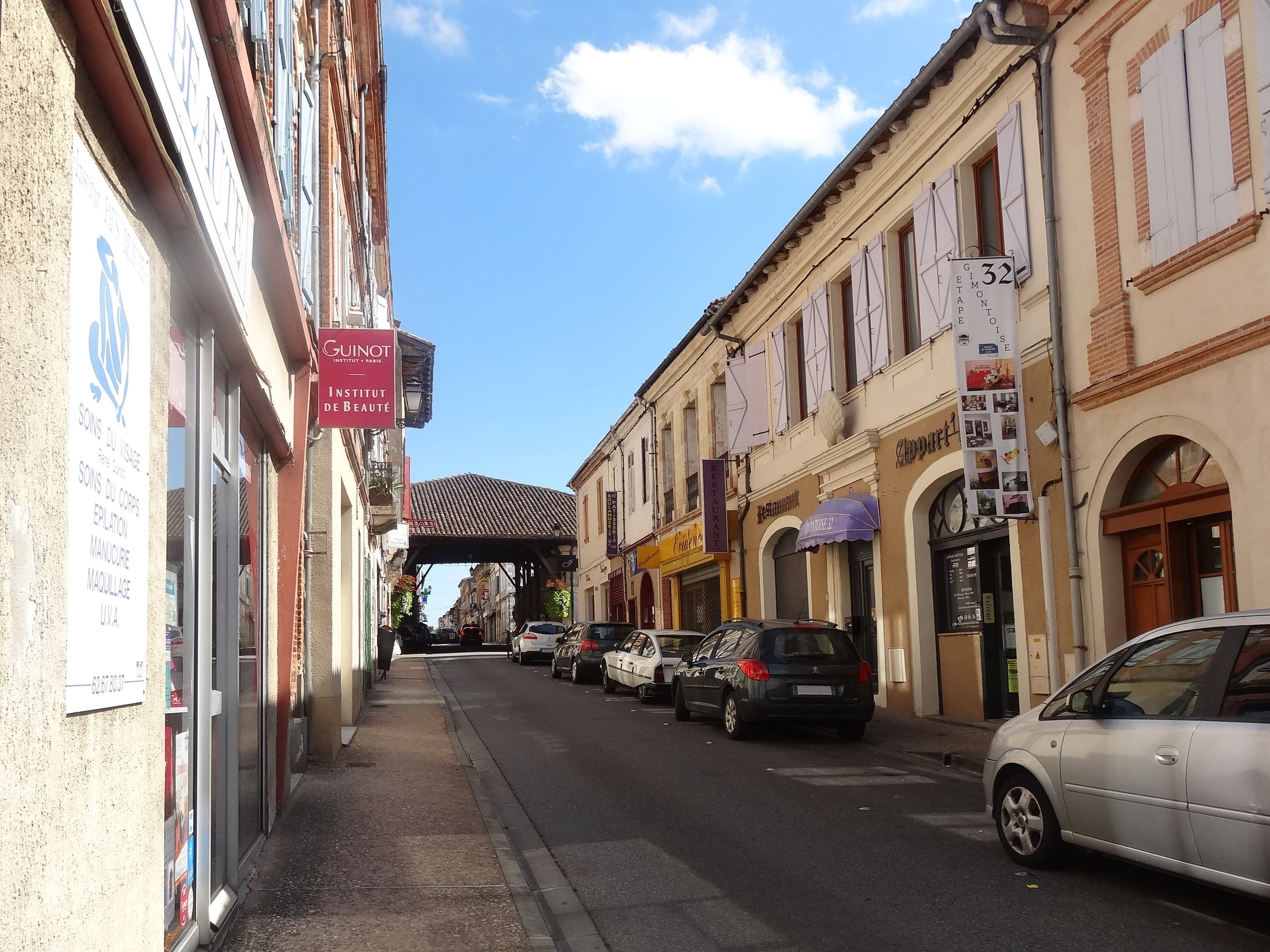 Rue nationale et halle de Gimont.